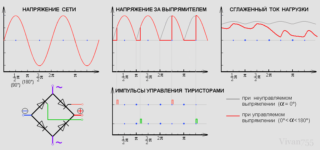 Иллюстрация к статье по фазовому регулированию выпрямленного напряжения и тока